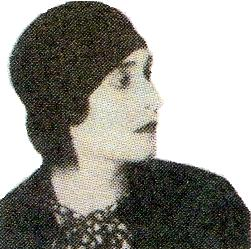 Fotografía de la escritora argentina Victoria Ocampo en la década de 1920.